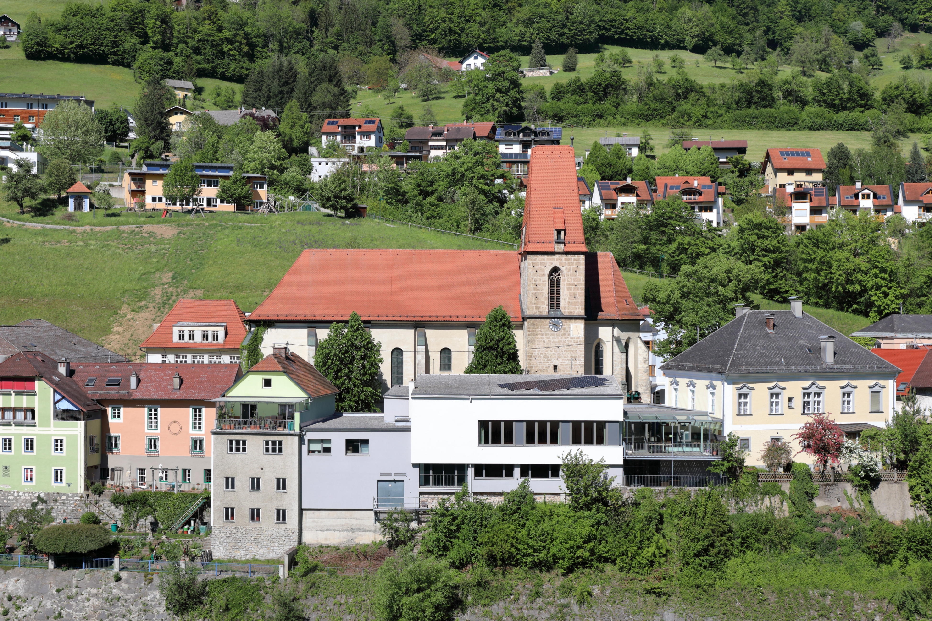 Südwestansicht der röm.-kath. Pfarrkirche hl. Blasius in der oberösterreichischen Gemeinde Losenstein und rechts davon der denkmalgeschützte Pfarrhof.Der Chor stammt aus der Mitte des 14. Jahrhunderts. Anfang des 16. Jahrhunderts wurde die Kirche vergrößert und 1514 geweiht. Nach einem Brand wurde 1837 das Langhaus verlängert. Der gotische Kirchturm im südlichen Chorwinkel wurde Anfang des 14. Jahrhunderts erbaut und hat eine Höhe von 34 Meter.